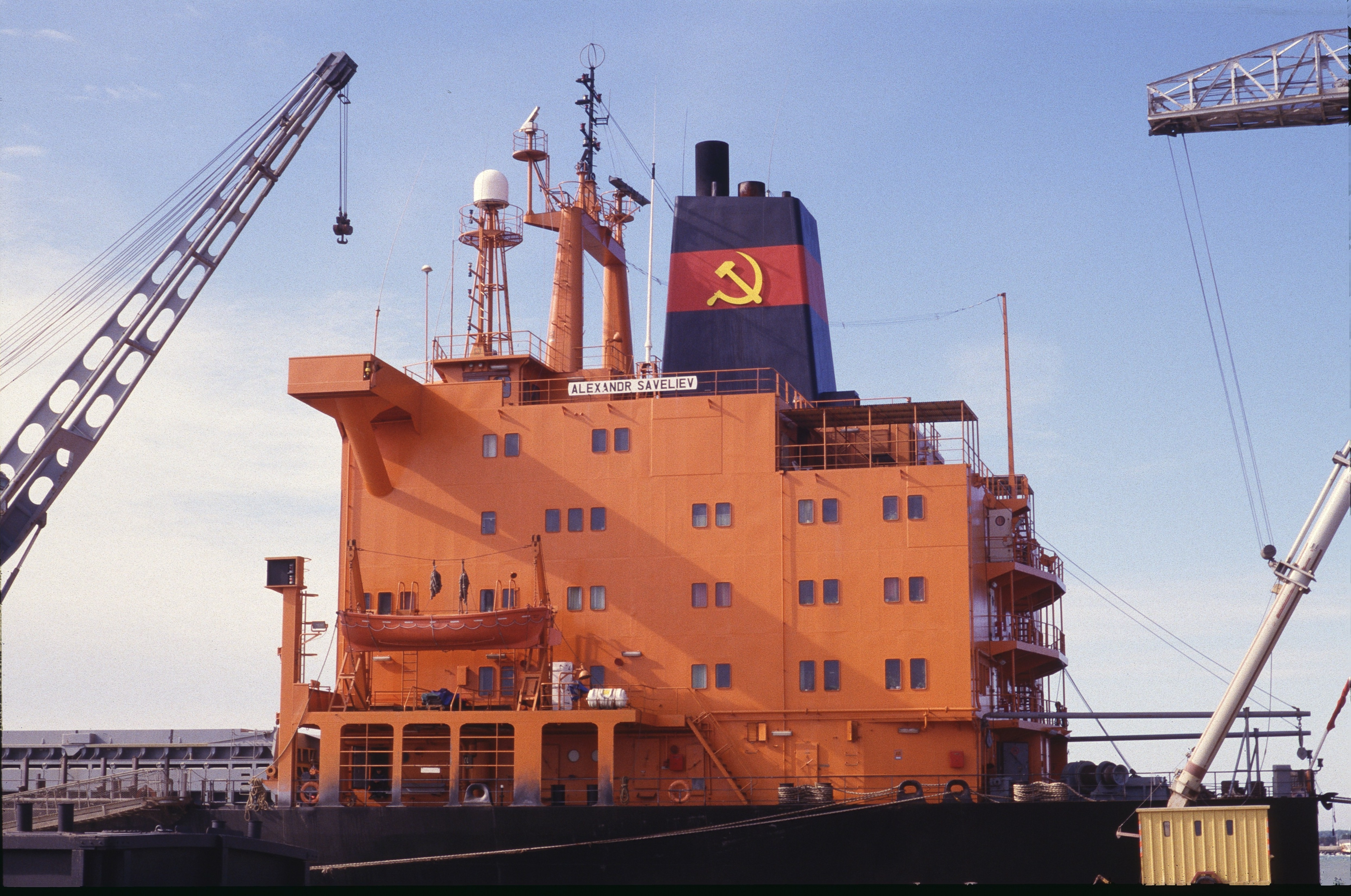 Le profil du château du navire de charge "Alexandr Saveliev". "Alexandr Saveliev": en russe "Александр Савельев". La Rochelle (Port de commerce de La Rochelle-Pallice), Charente Maritime, France.